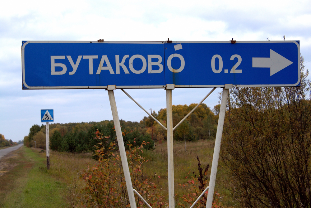 Дорожный указатель в селе Бутаково Знаменского района Омской области.